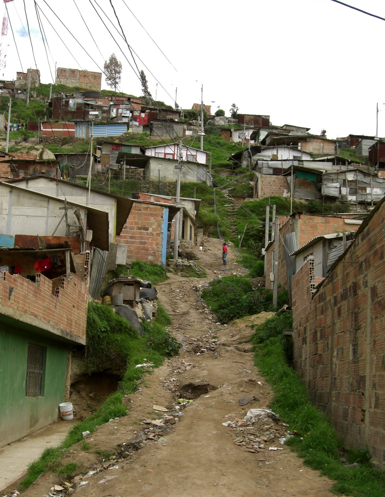 Ciudad Bolívar (Bogotá) Ciudad Bolívar (Bogotá)